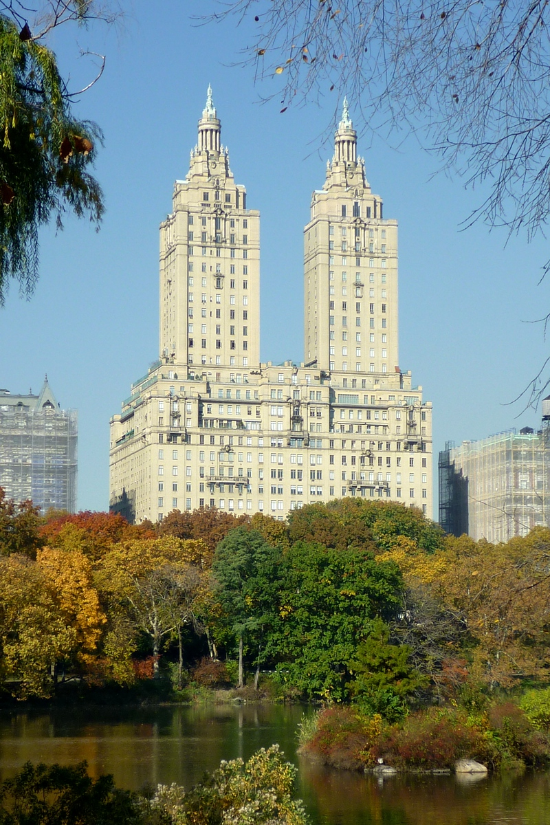 San Remo-Apartmenthaus an des Westseite des Central Parks in Manhattan, New York City